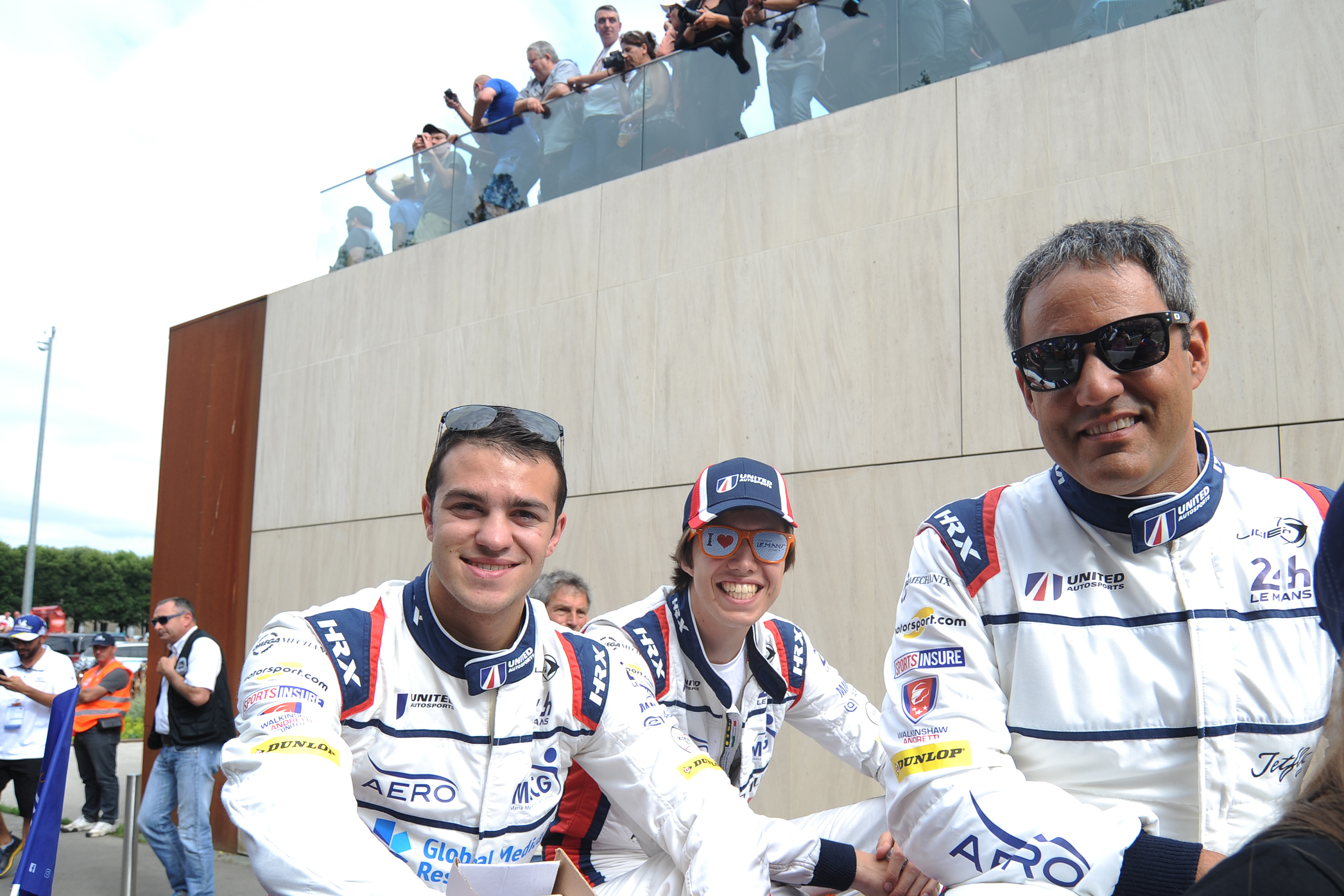 United Autosport lors des 24 Heures du Mans 2018.